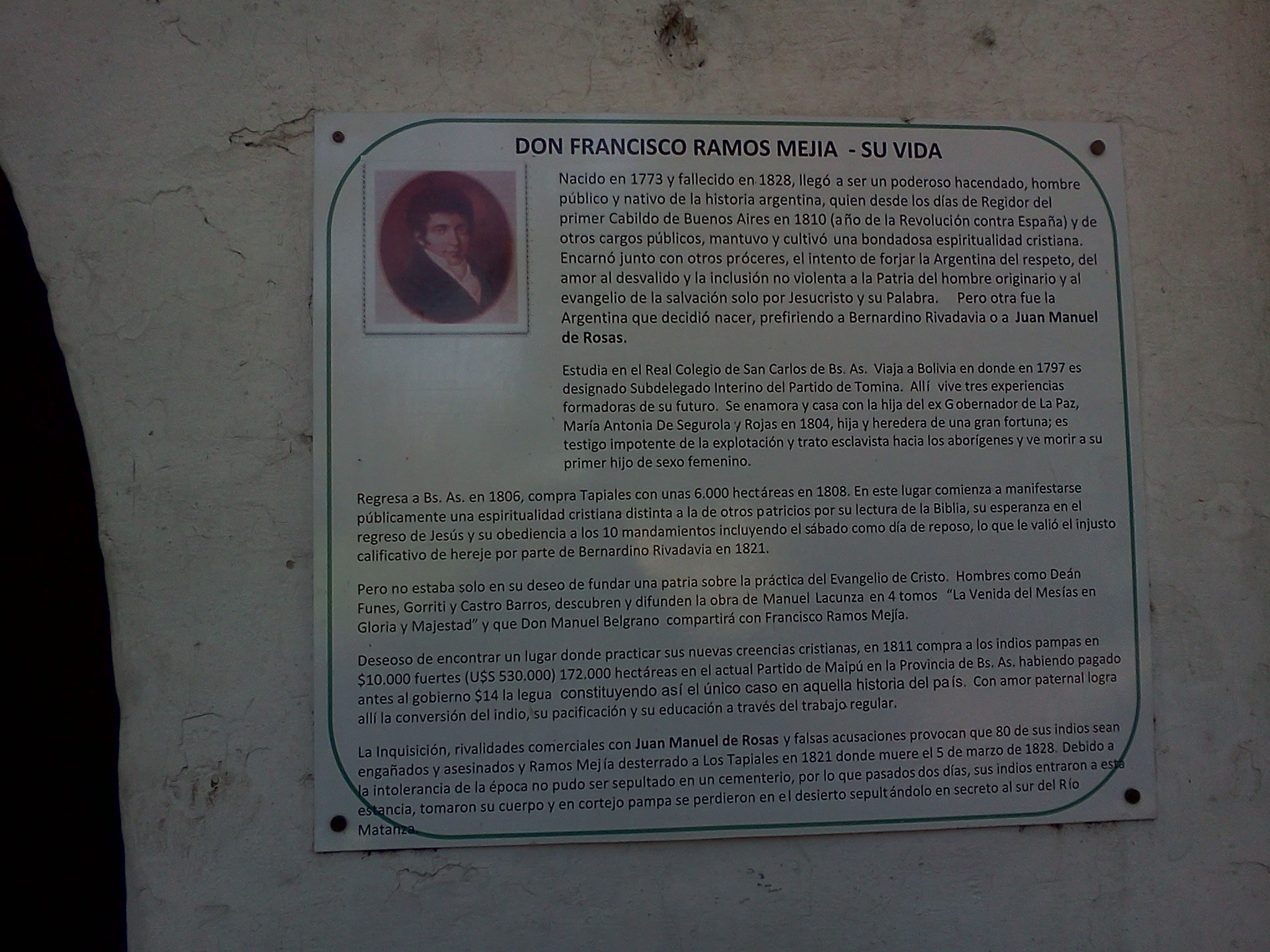 Un cartel nos narra brevemente la vida de Ramos Mejía, antiguo dueño de la hacienda Los Tapiales.